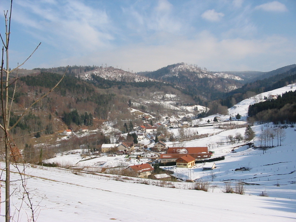 La Croix-aux-Mines Commune des Vosges Le hameau du Chipal Photographie personnelle, prise le 15 mars 2006 Copyright © Christian Amet